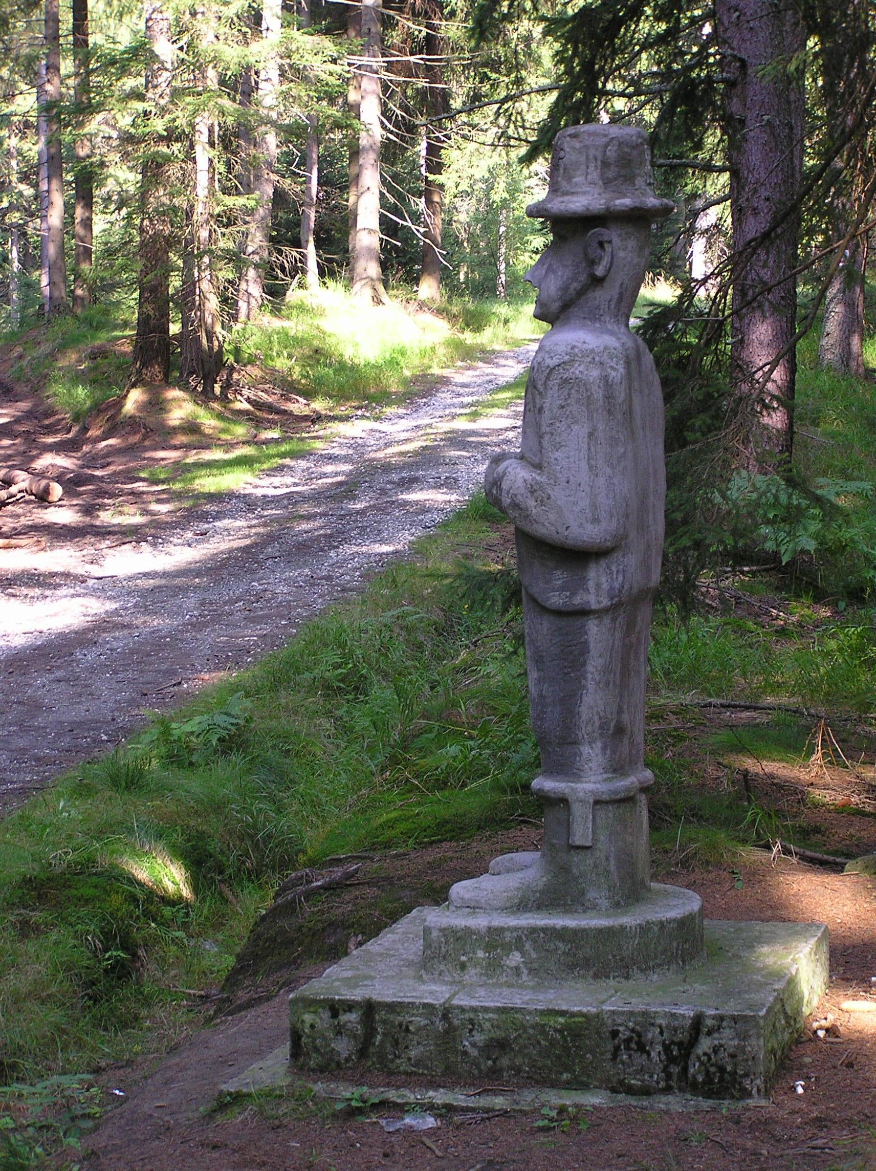 Steinerner Mann oder Grauer Mann an der "Spätenwalder Ewigkeit" (Wieczność) genannten Waldschneise im Nesselgrunder Forst, Habelschwerdter Gebirge, Woiwodschaft Niederschlesien, Polen.